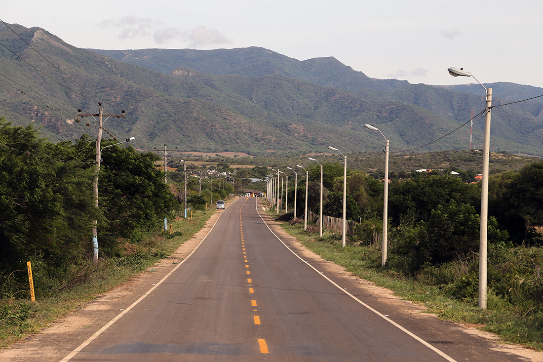 Ingreso a Pampagrande